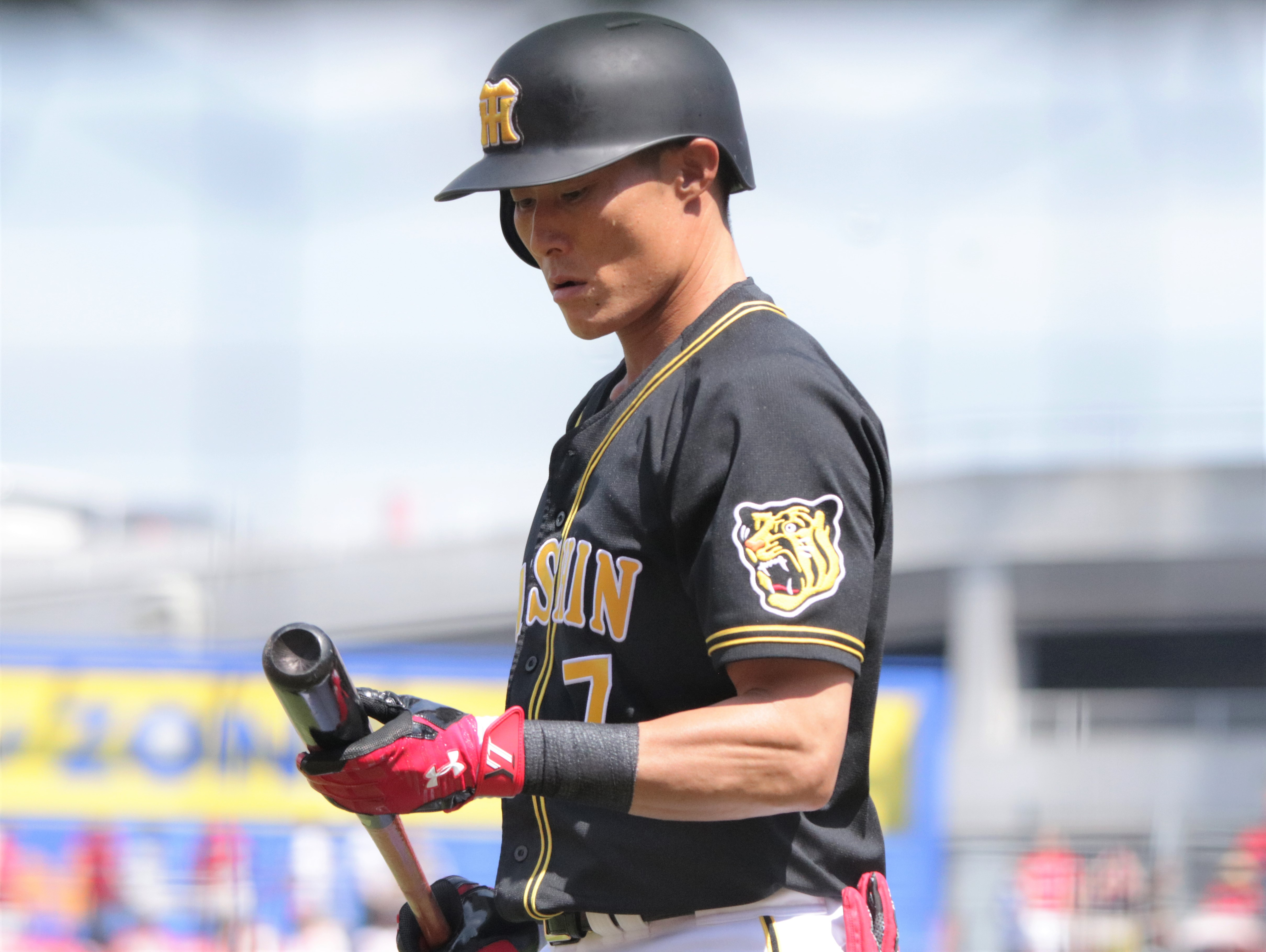 2018/5/12 マツダスタジアム